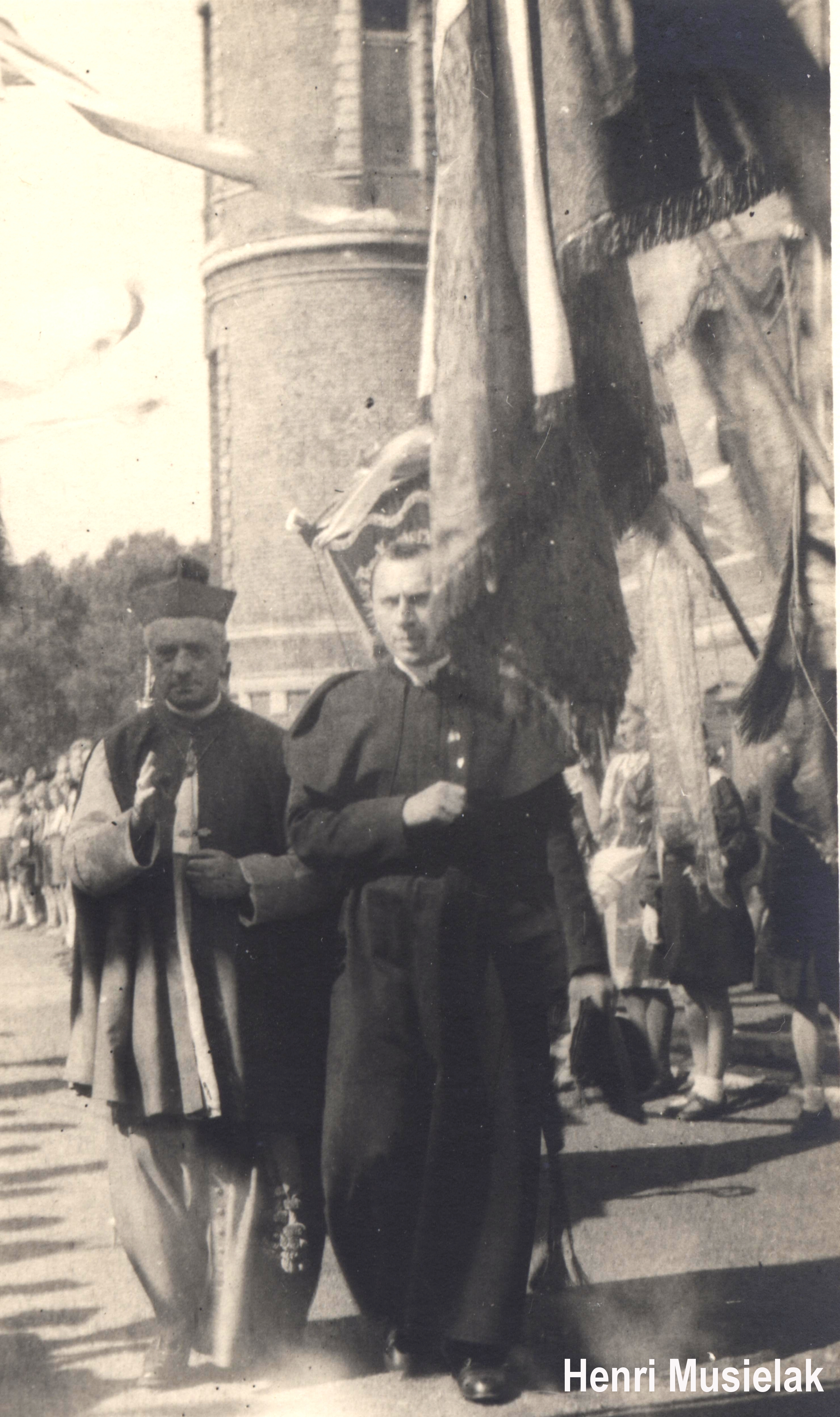 Visite pastorale de Mgr Karol Radoński à la communauté polonaise de Montigny-en-Ostrevent (France), accompagné du Père Franciszek Ciegiełka, recteur de la Mission Catholique Polonaise à Paris, le 15 juillet 1945.